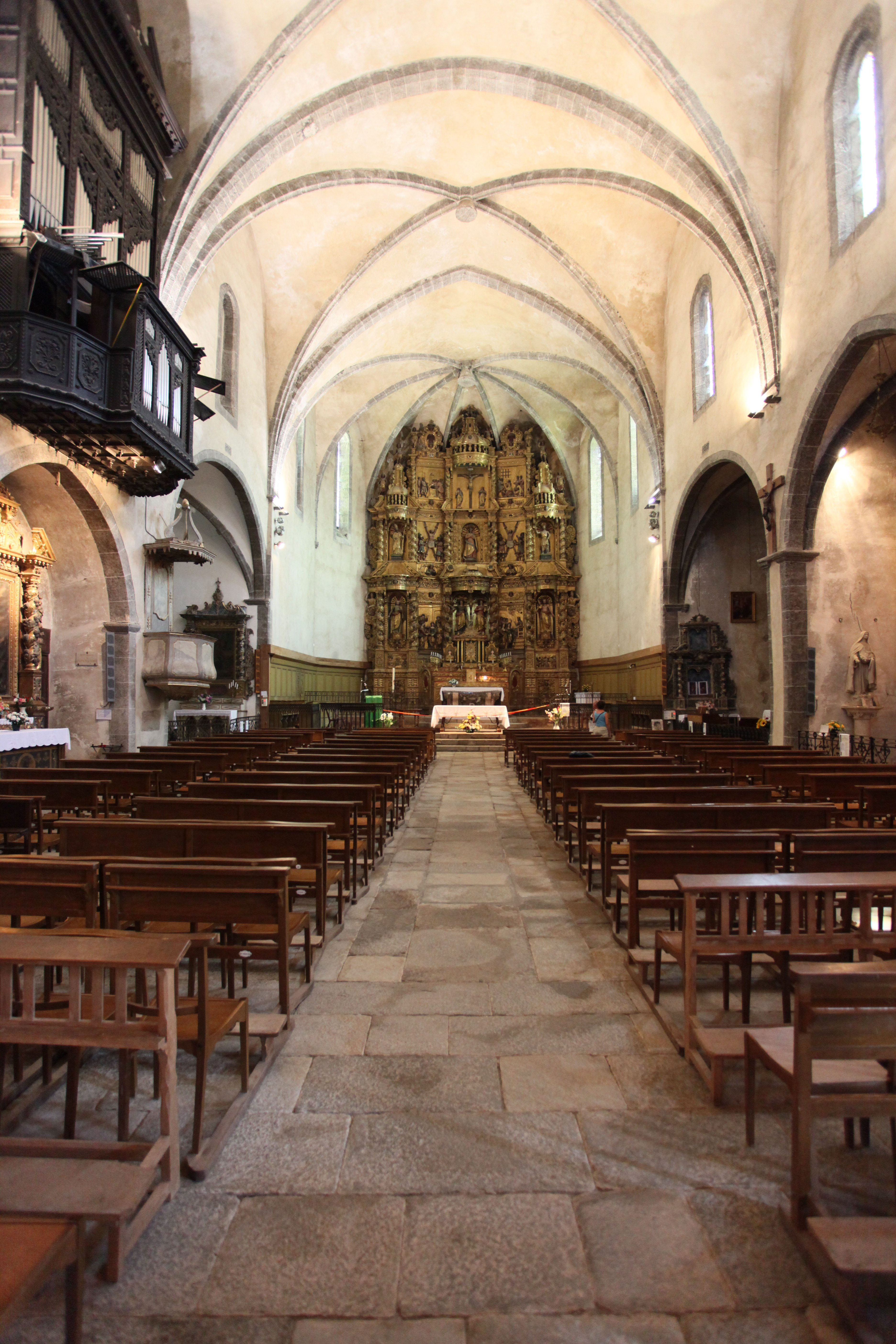 Prats de Mollo (66, France) : l'intérieur de l'église.